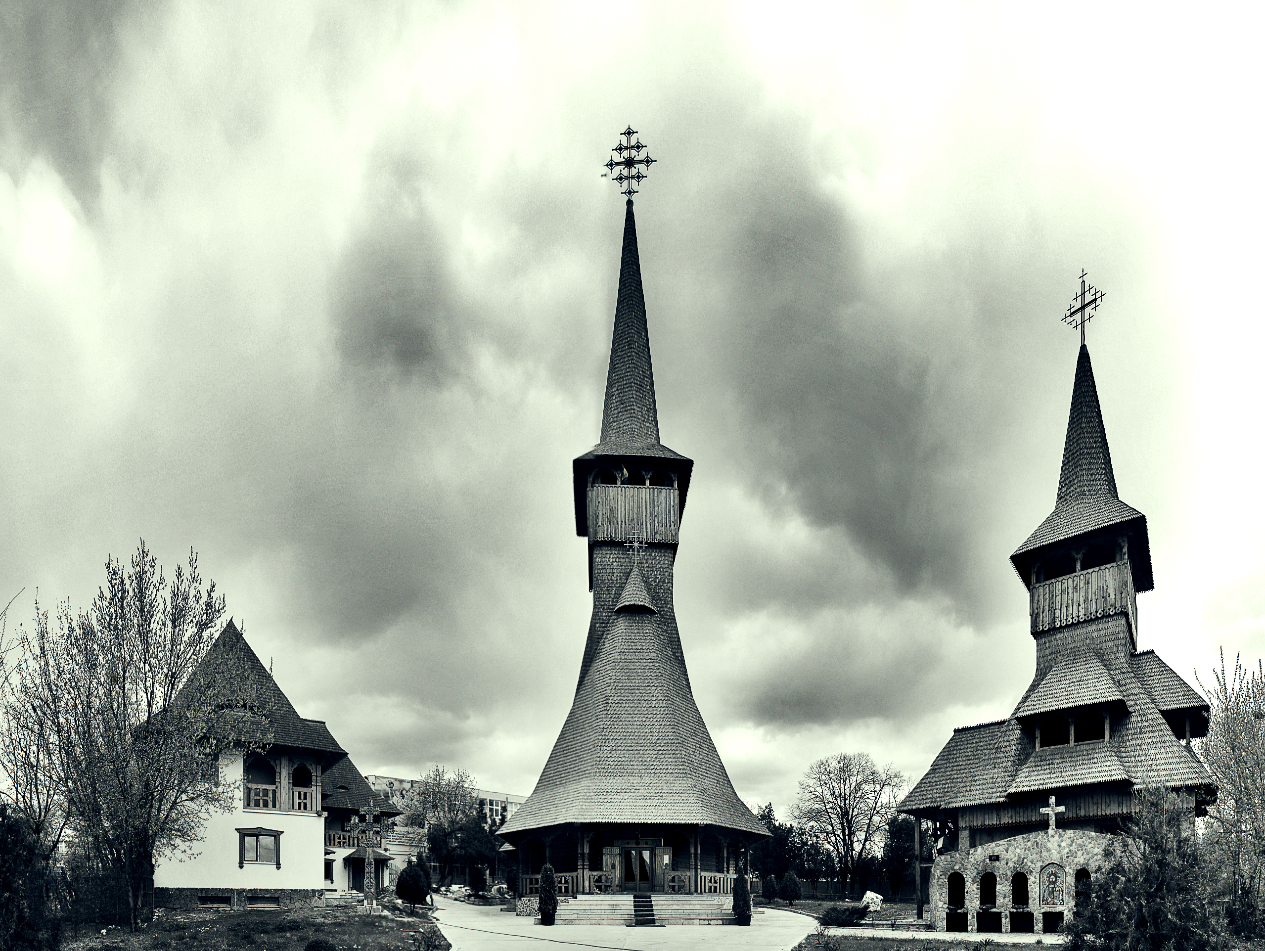 Biserica Trei Ierarhi din Fundeni, București. Ctitorită 2001